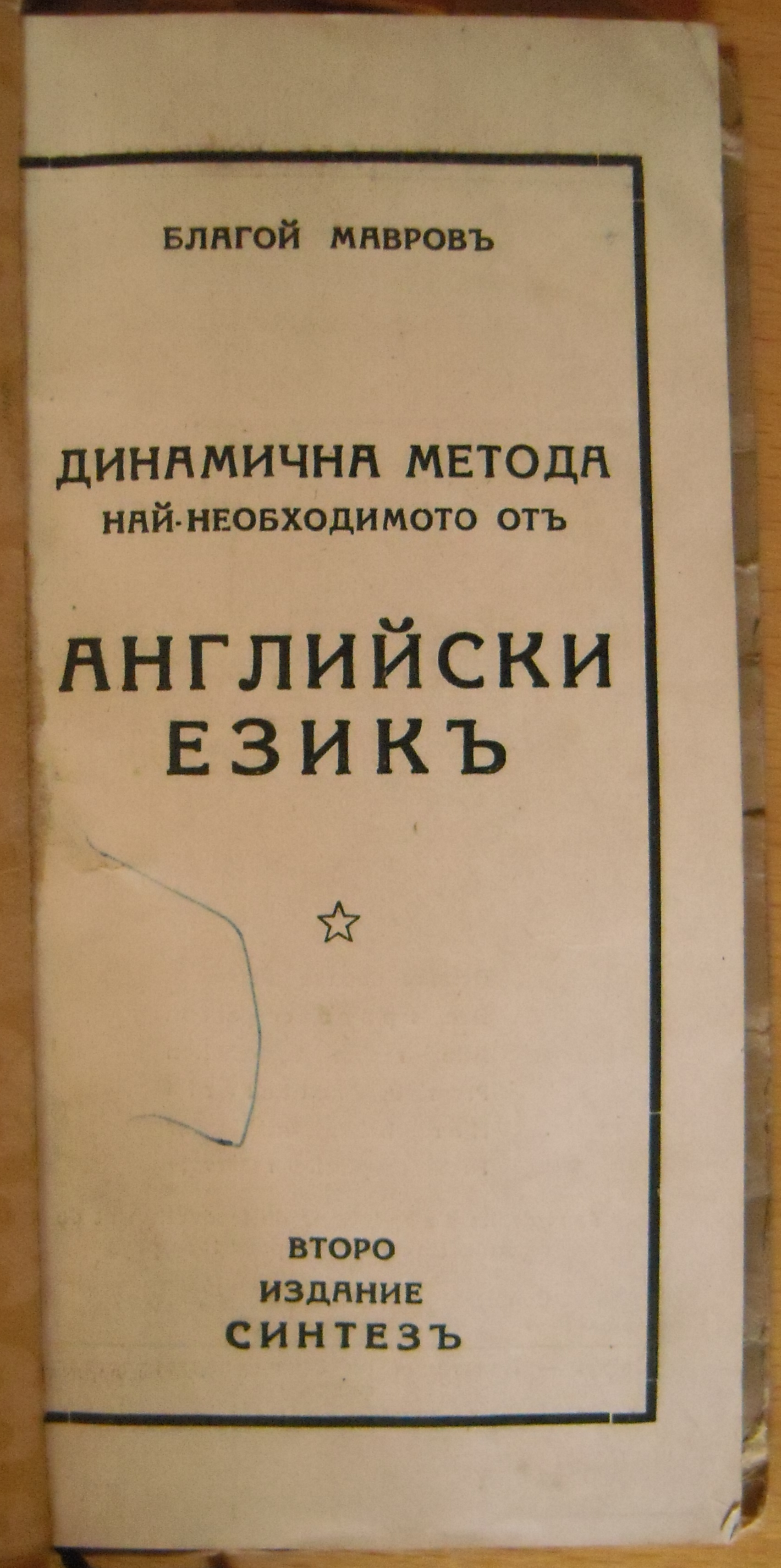 Речник за галицизми, неологизми и фамилиарни френски изрази, Солун, 1910